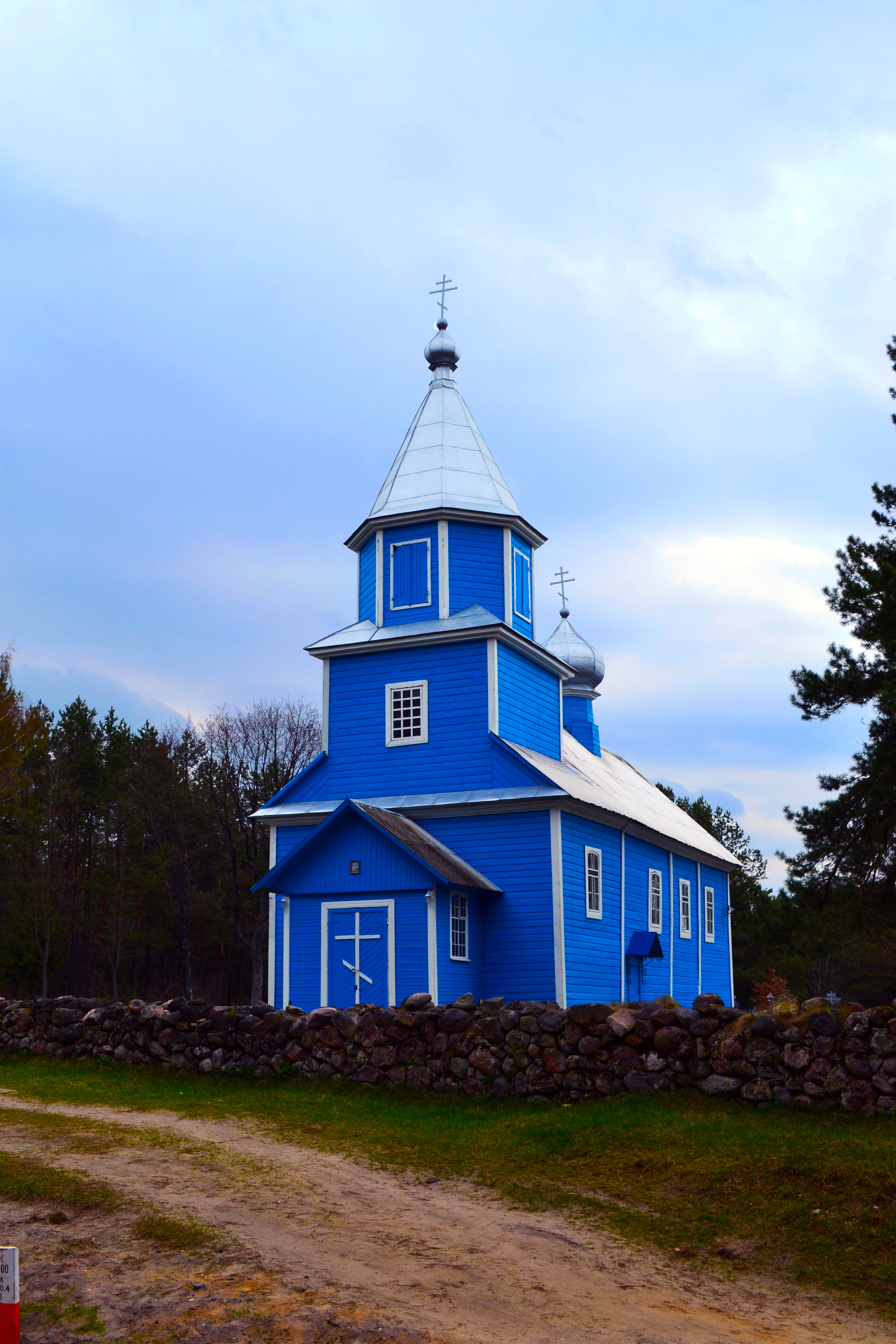 Беларуская (тарашкевіца): Царква сьвятога Мікалая ў Вежным (Пружанскі раён) This is a photo of Belarusian heritage monument. Reference number: 113Г000604 ( WLM)